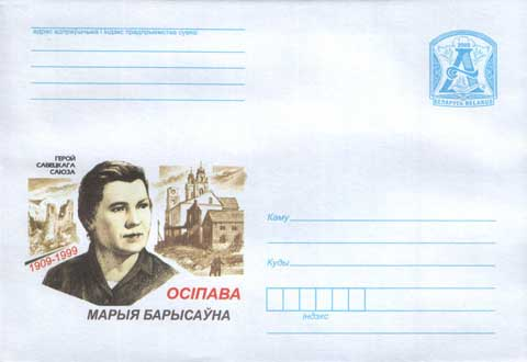 Конверт с маркой Республики Беларусь. Осiпава Марыя Барысаўна. 1909-1999. Герой Савецкага Саюза. (Осипова Мария Борисовна. 1909-1999. Герой Советского Союза – на бел. языке, портрет). Заказ 8447-08. Тираж 32 000 экз.